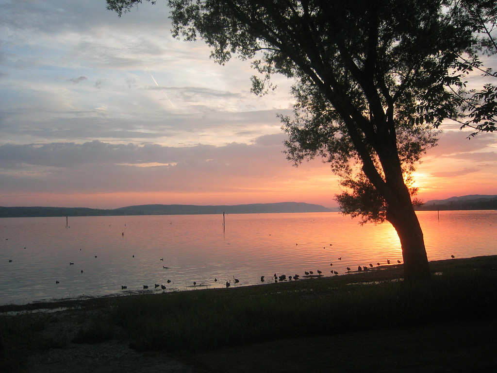 Bodensee (Lake Constance) Sonnenuntergang am Überlinger See.